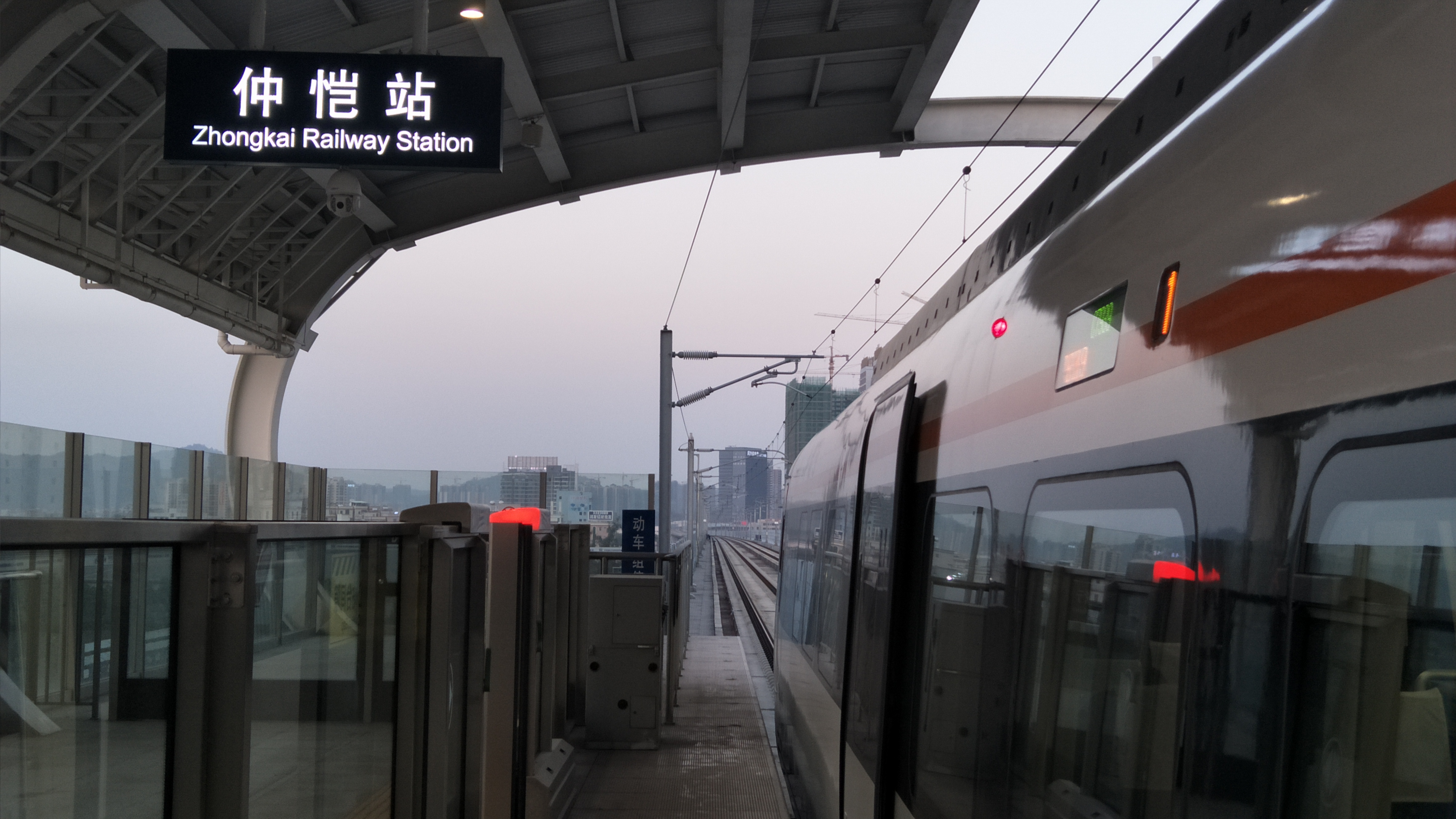 仲恺站的月台